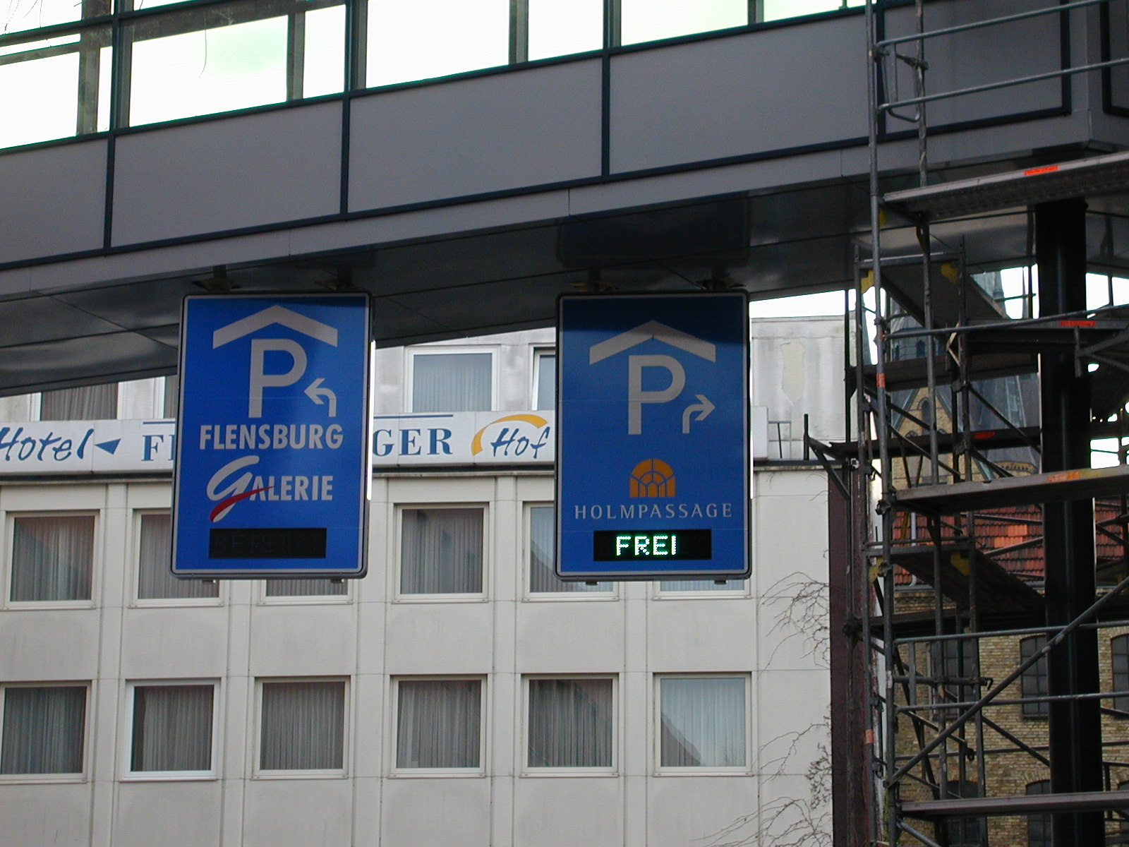 Beispiel für Parkhausanzeigen